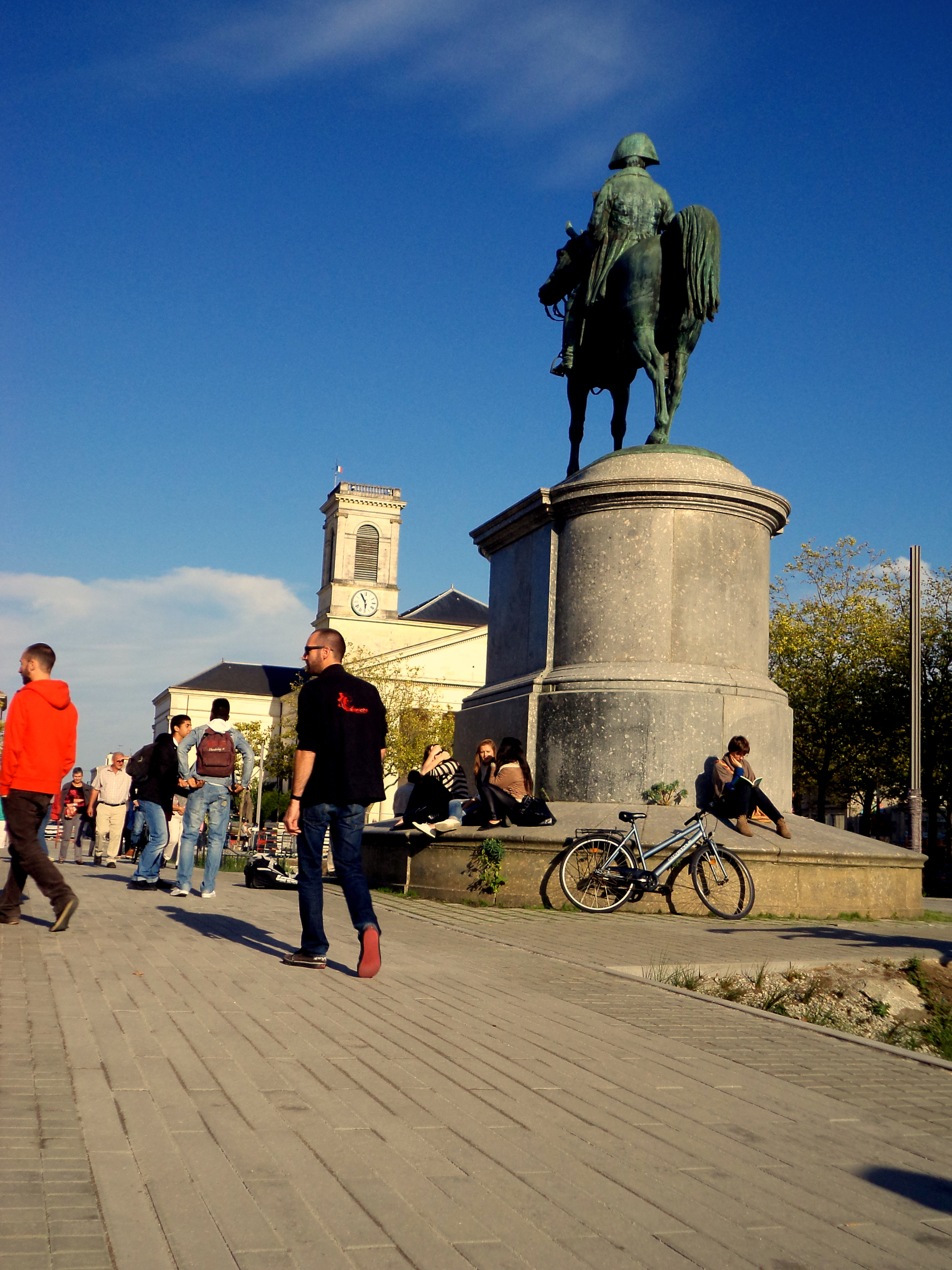 Réaménagement par Alexandre Chemetoff. Photo visible également sur Flickr (ChevillonW)